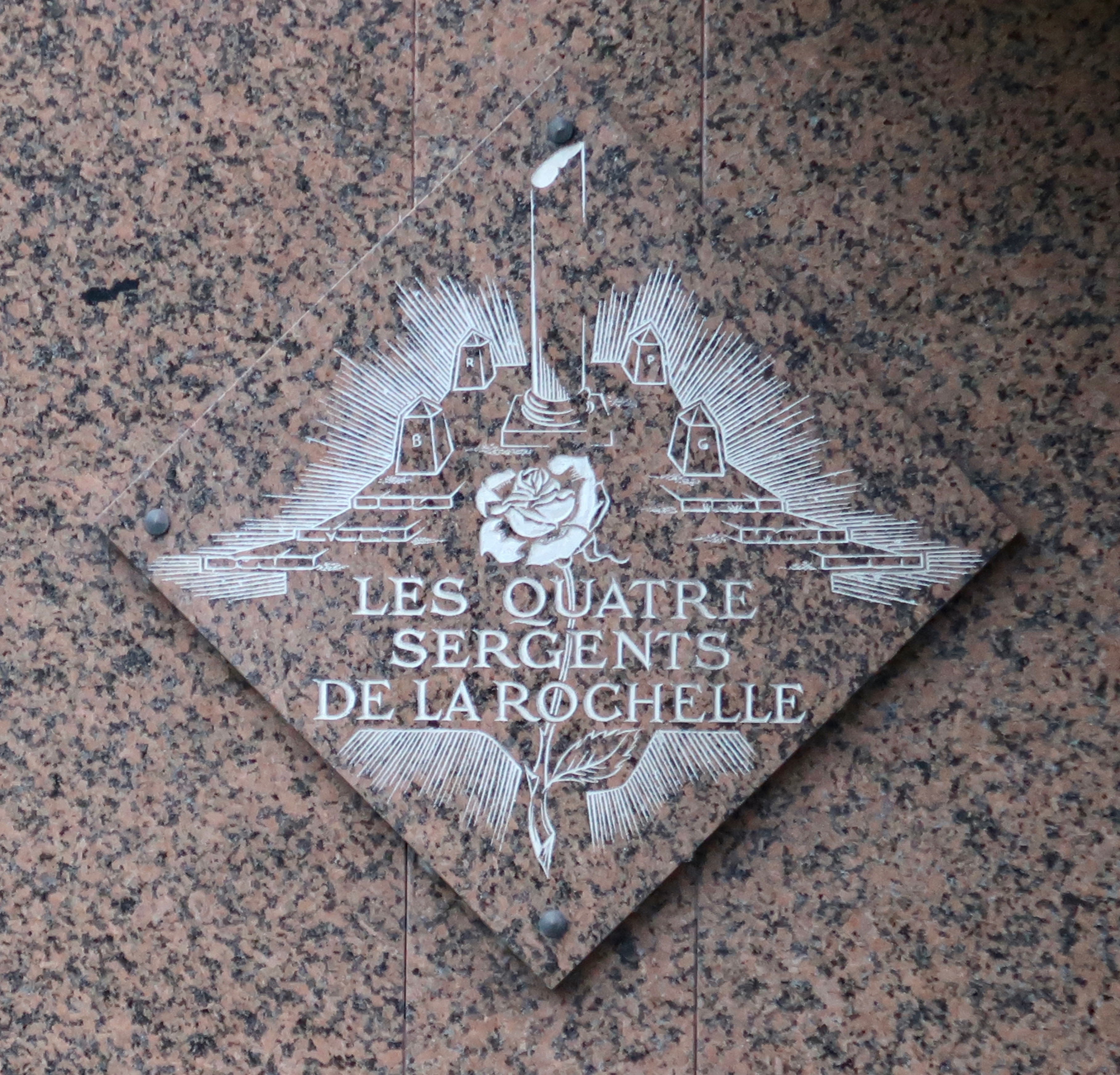 Plaque en hommage au Quatre sergents de la Rochelle, 1 rue Émile-Richard (Paris, 14e).